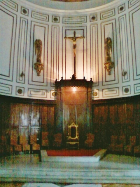 Cátedra de la Catedral de San Felipe, Chile.